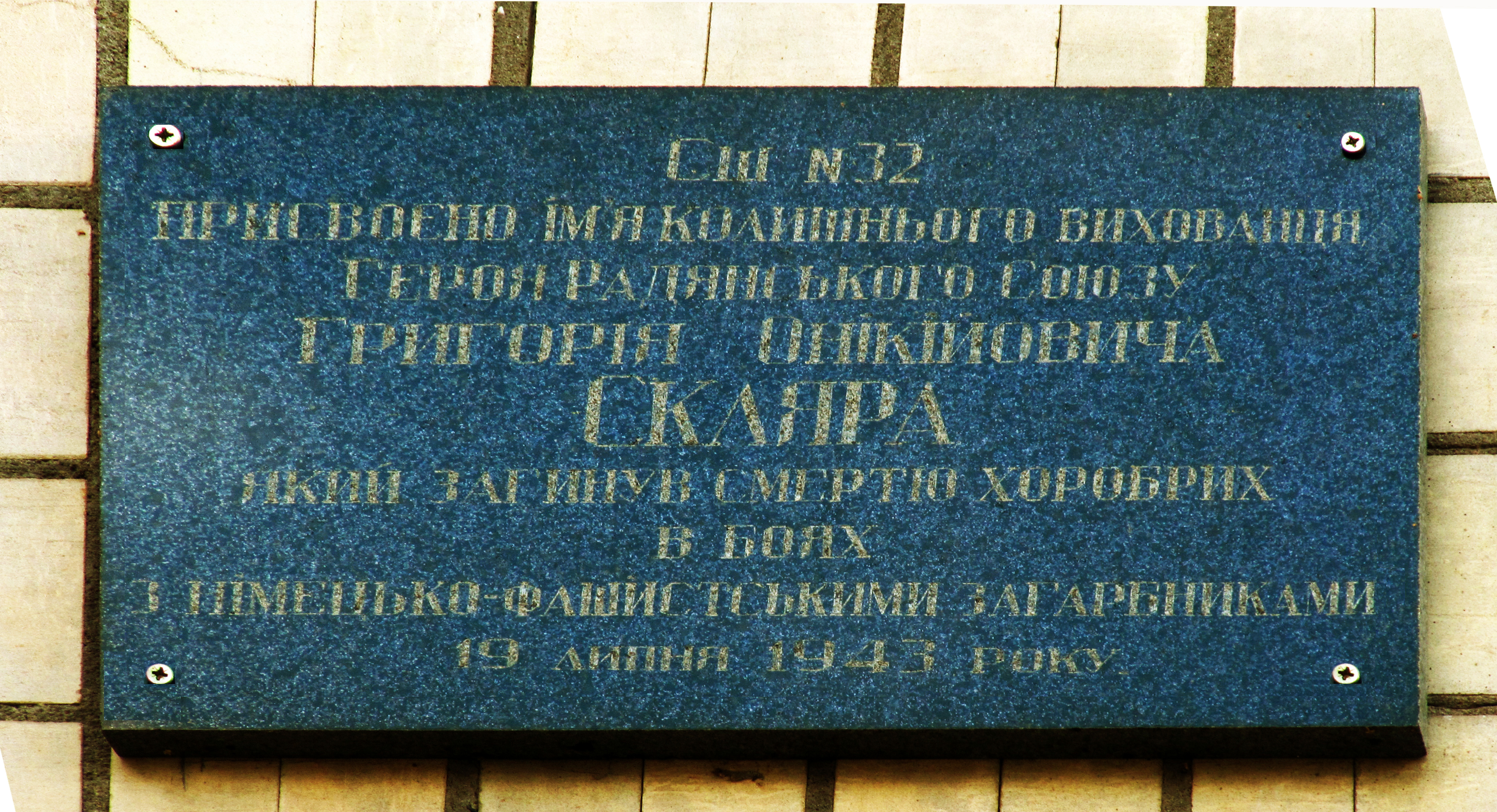 Пам’ятний знак «Школа в якій навчався Герой Радянського Союзу Г.Скляр», Кривий Ріг, мкр. 7-й Зарічний, 7 (школа №32). Насправді Скляр навчався в старій школі №32, будівля якої збереглася і являється пам'яткою 12-110-0130 за списком WLM. Старе приміщення більше не являється школою, там тепер центр дитячої реабілітації, і шкільний №32 у нього забрали. А після цього новій школі в іншому районі присвоїли №32 і назвали її на честь Скляра, та встановили на ній відповідну меморіальну табличку. Нова школа - на знімку.